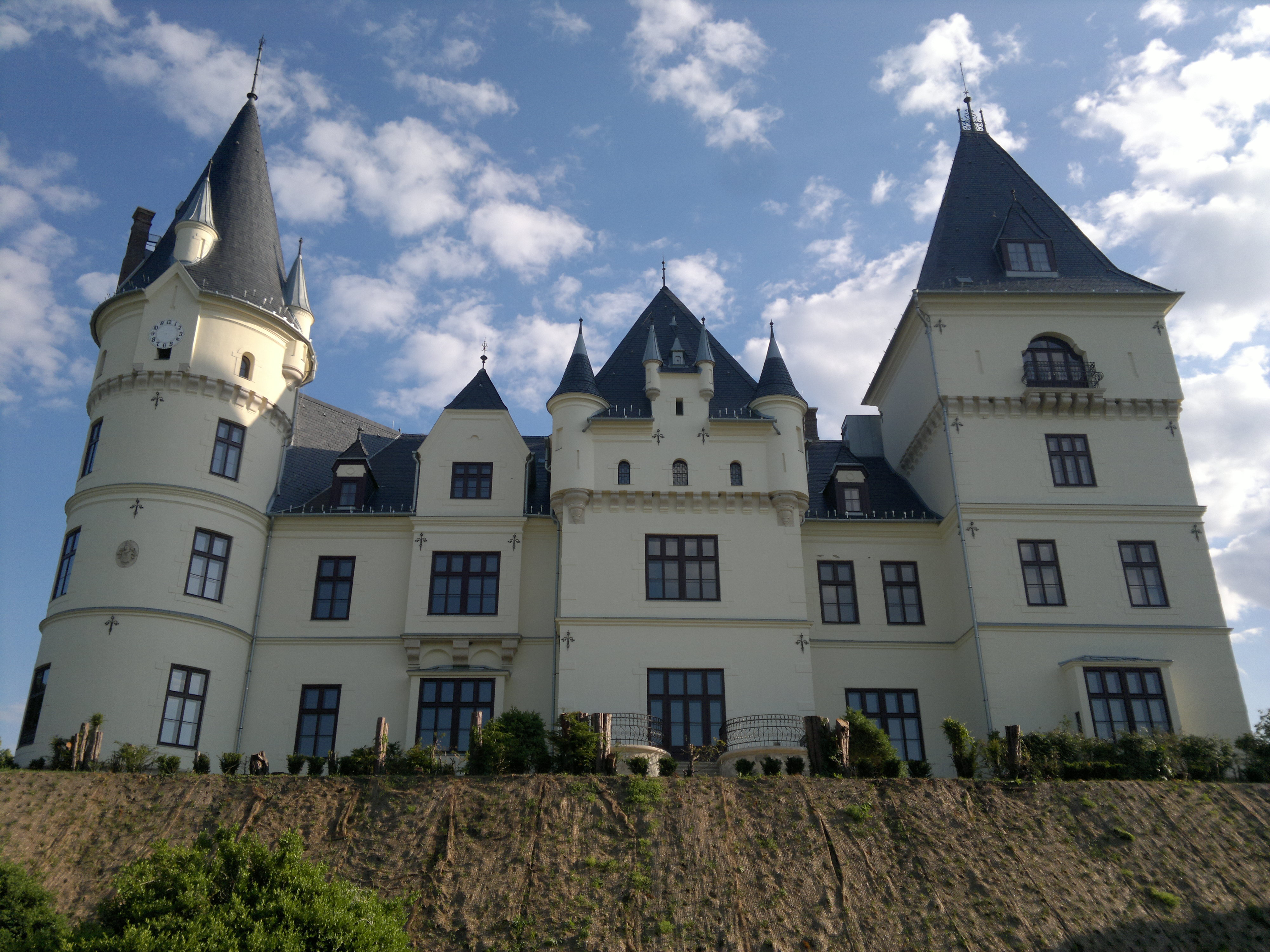 Andrássy-kastély. Tiszadob